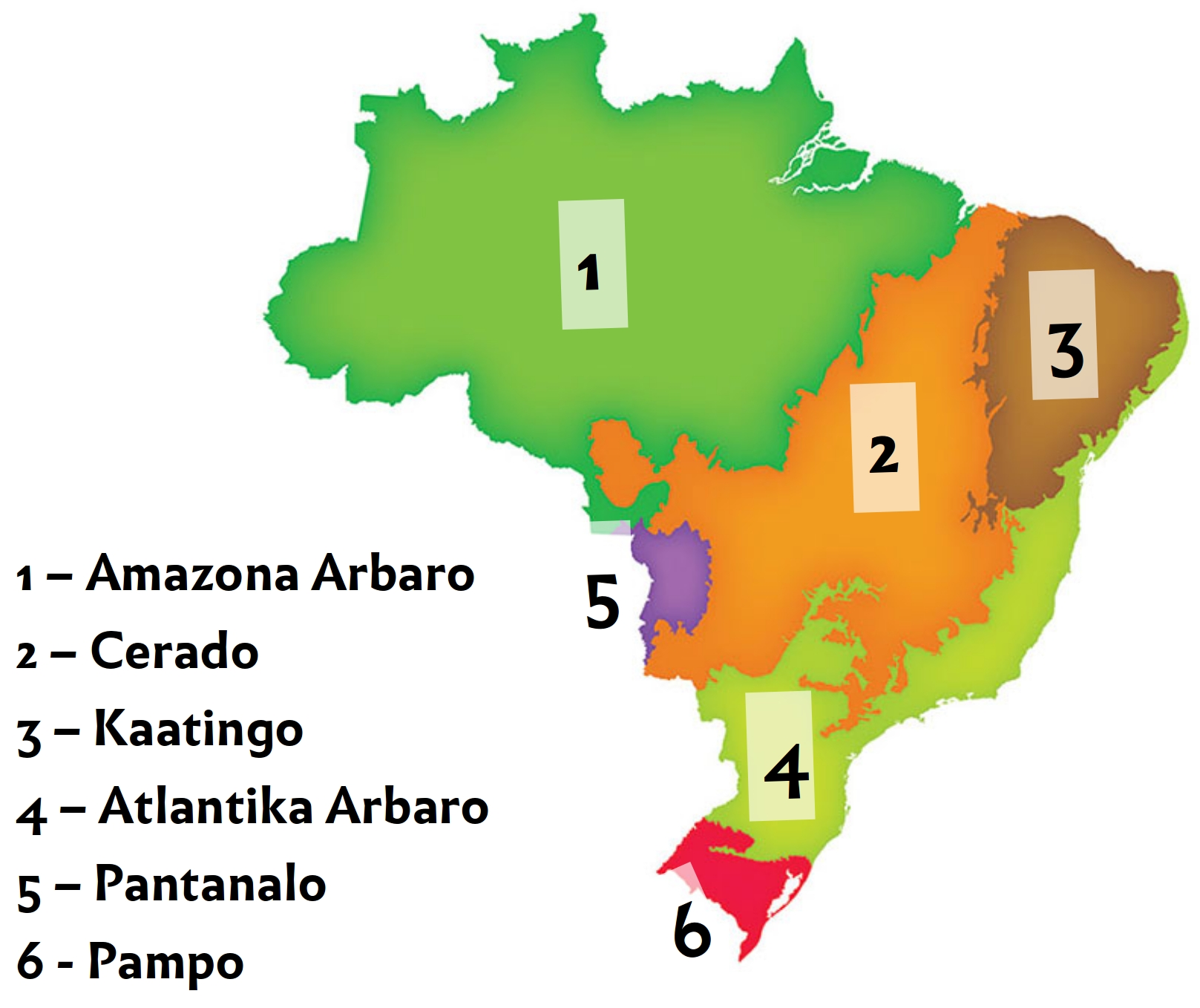 Nomoj de brazilaj biomoj en Esperanto